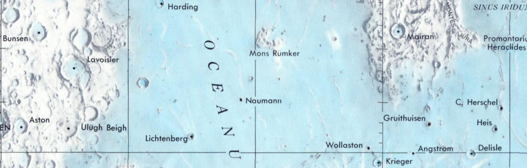 Mons Rümker. Localización. (Lunar Chart LPC1. Second Edition)